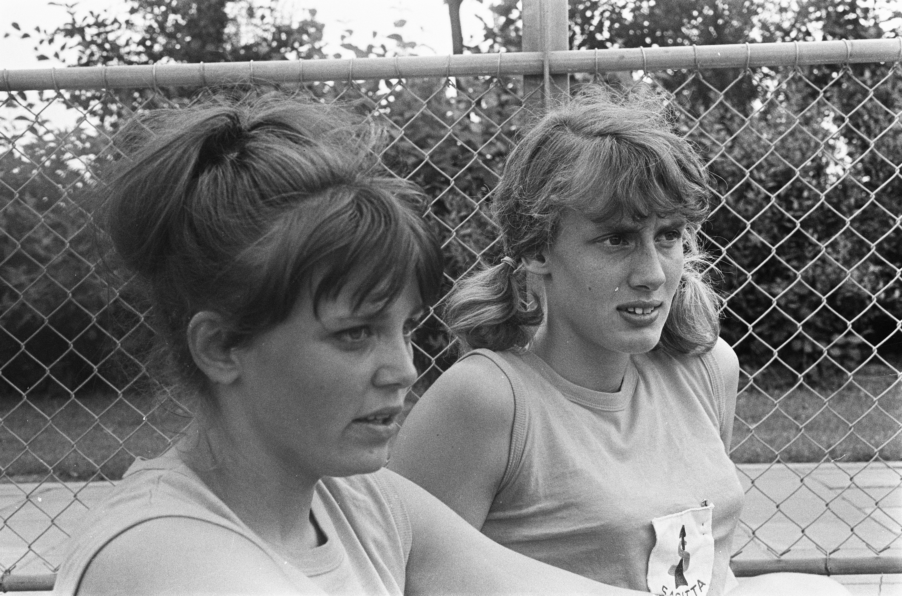 Collectie / Archief : Fotocollectie Anefo Reportage / Serie : [ onbekend ] Beschrijving : Atletiekwedstrijden op sportpark Ookmeer. Hilda Slaman (links) en Stans Brehm Datum : 6 augustus 1967 Locatie : Amsterdam Trefwoorden : atletiek, sport Persoonsnaam : Brehm, Stans, Hilda Slaman Fotograaf : Koch, Eric / Anefo, [onbekend] Auteursrechthebbende : Nationaal Archief Materiaalsoort : Negatief (zwart/wit) Nummer archiefinventaris : bekijk toegang 2.24.01.05 Bestanddeelnummer : 920-5727